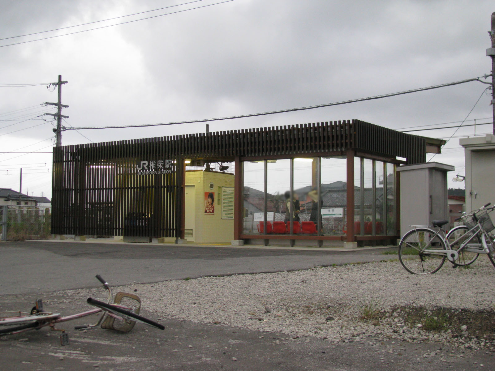 JR成田線椎柴駅